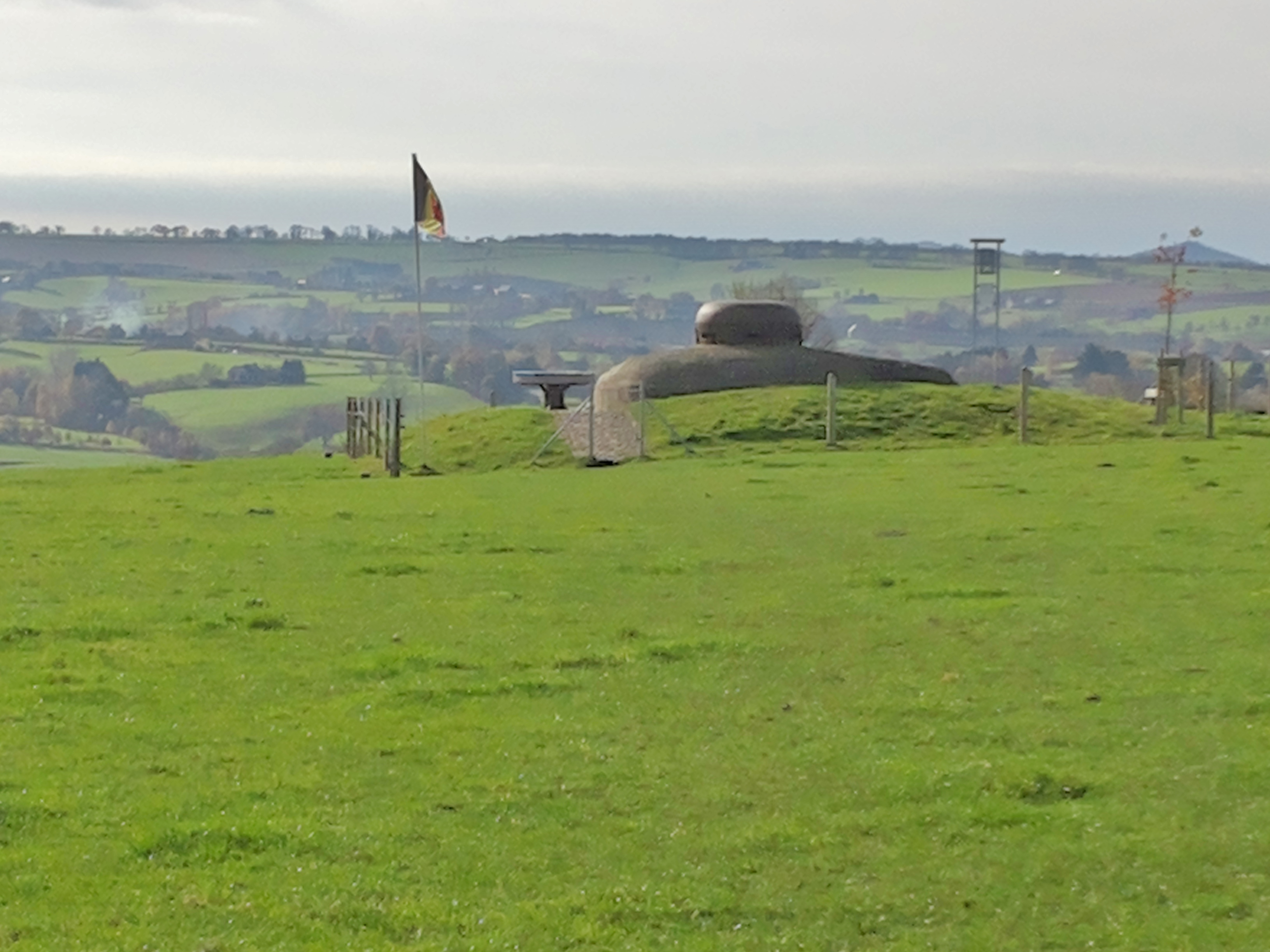 Artilleriebeobachterbunker oberhalb des Tales "Val Dieu", nah bei St. Jean-Sart, Belgien